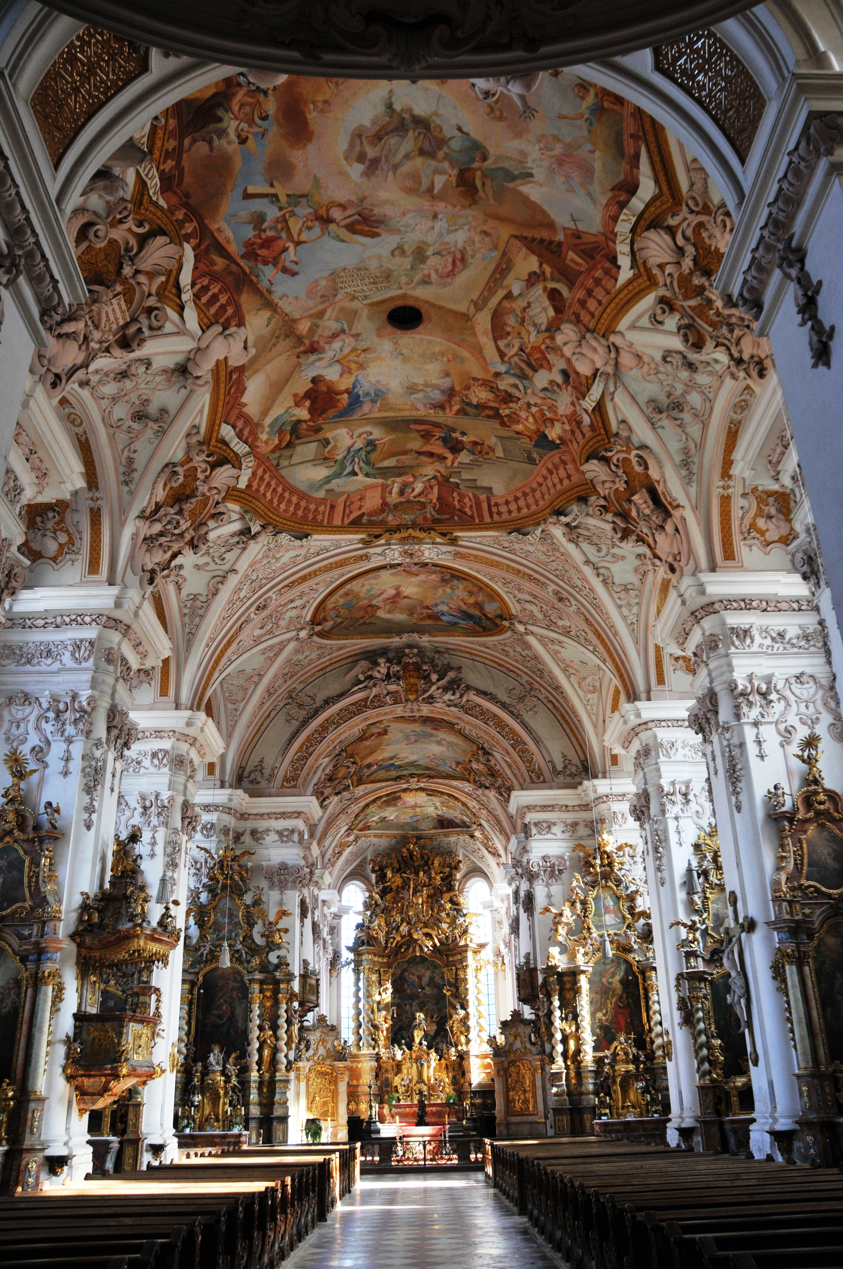 Aldersbach, Kircheninneres